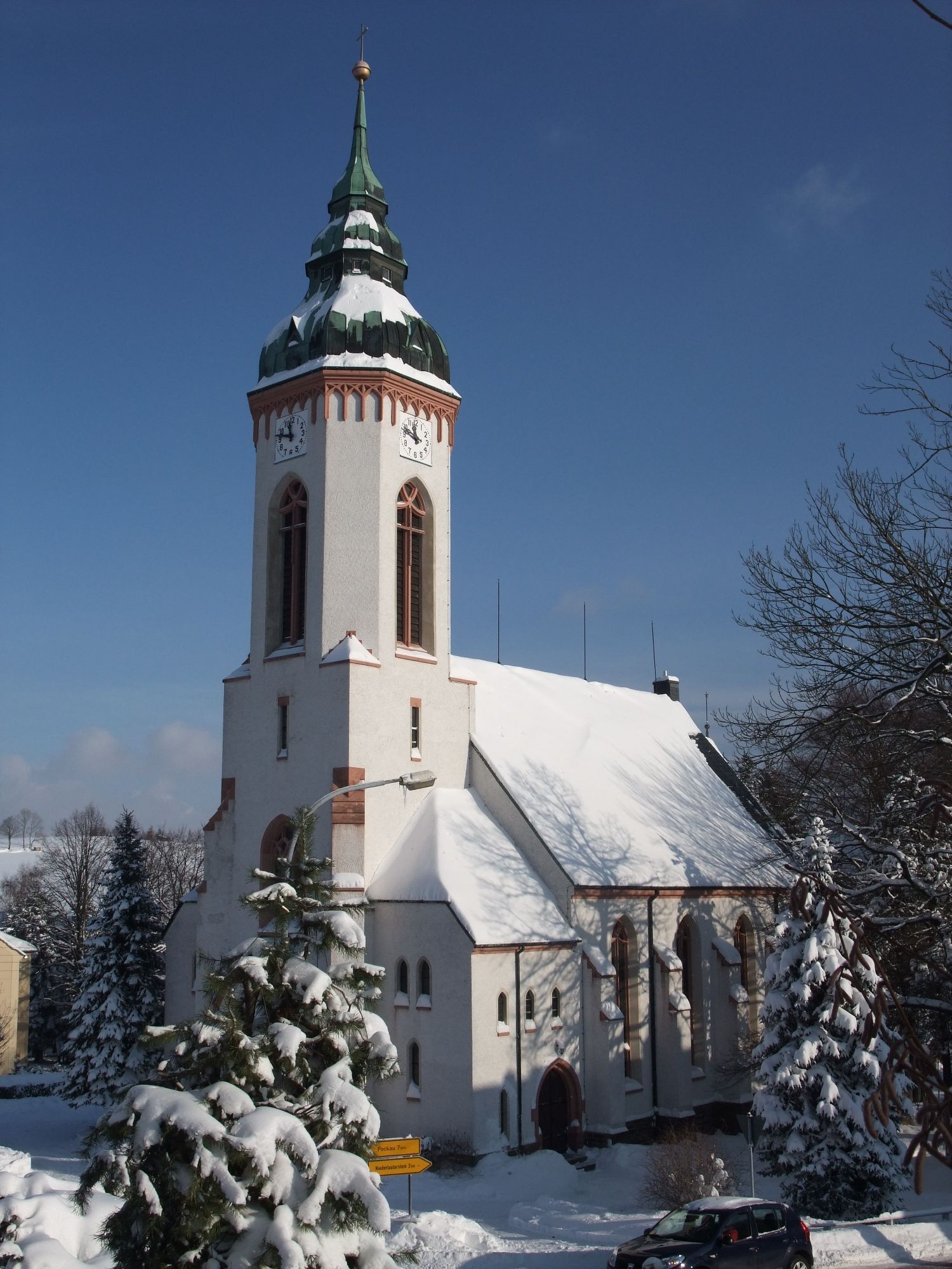 Die Heilandskirche in Lauterbach (Erzgebirge) von Südwesten gesehen.